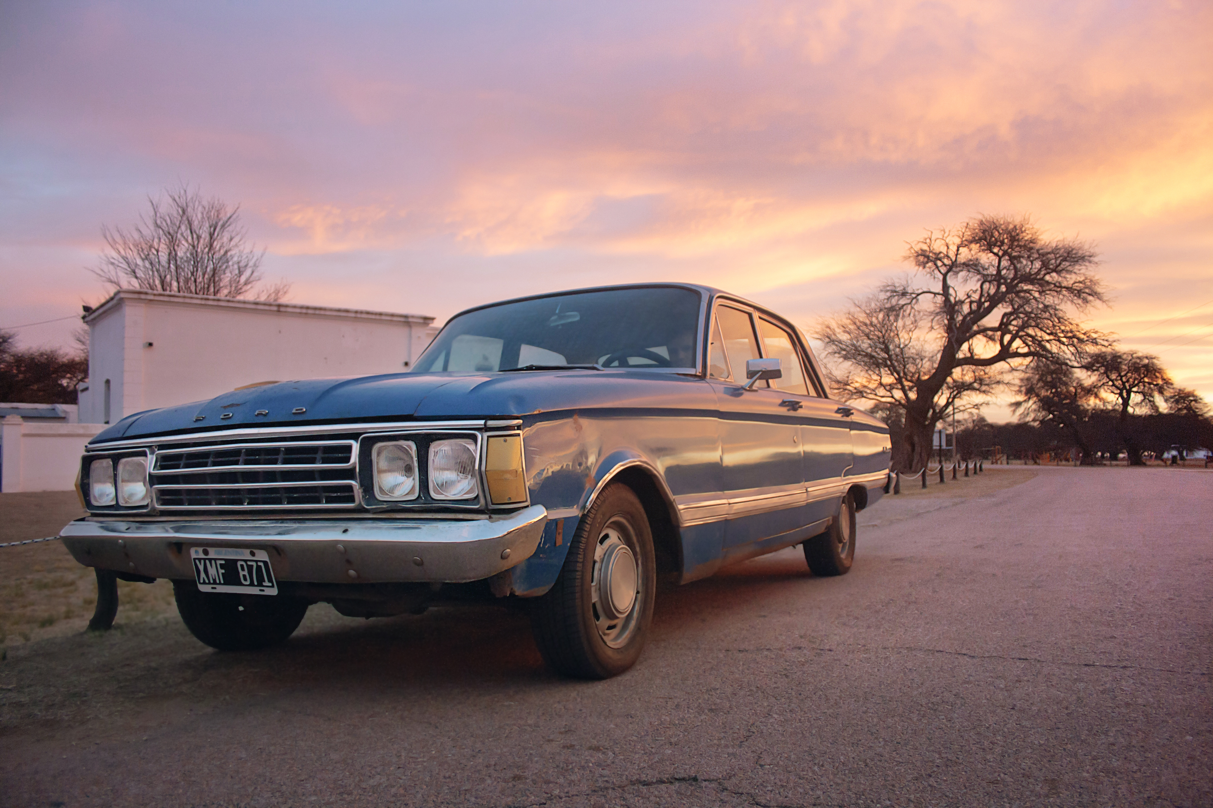 Parque Luro, La Pampa, Argentina